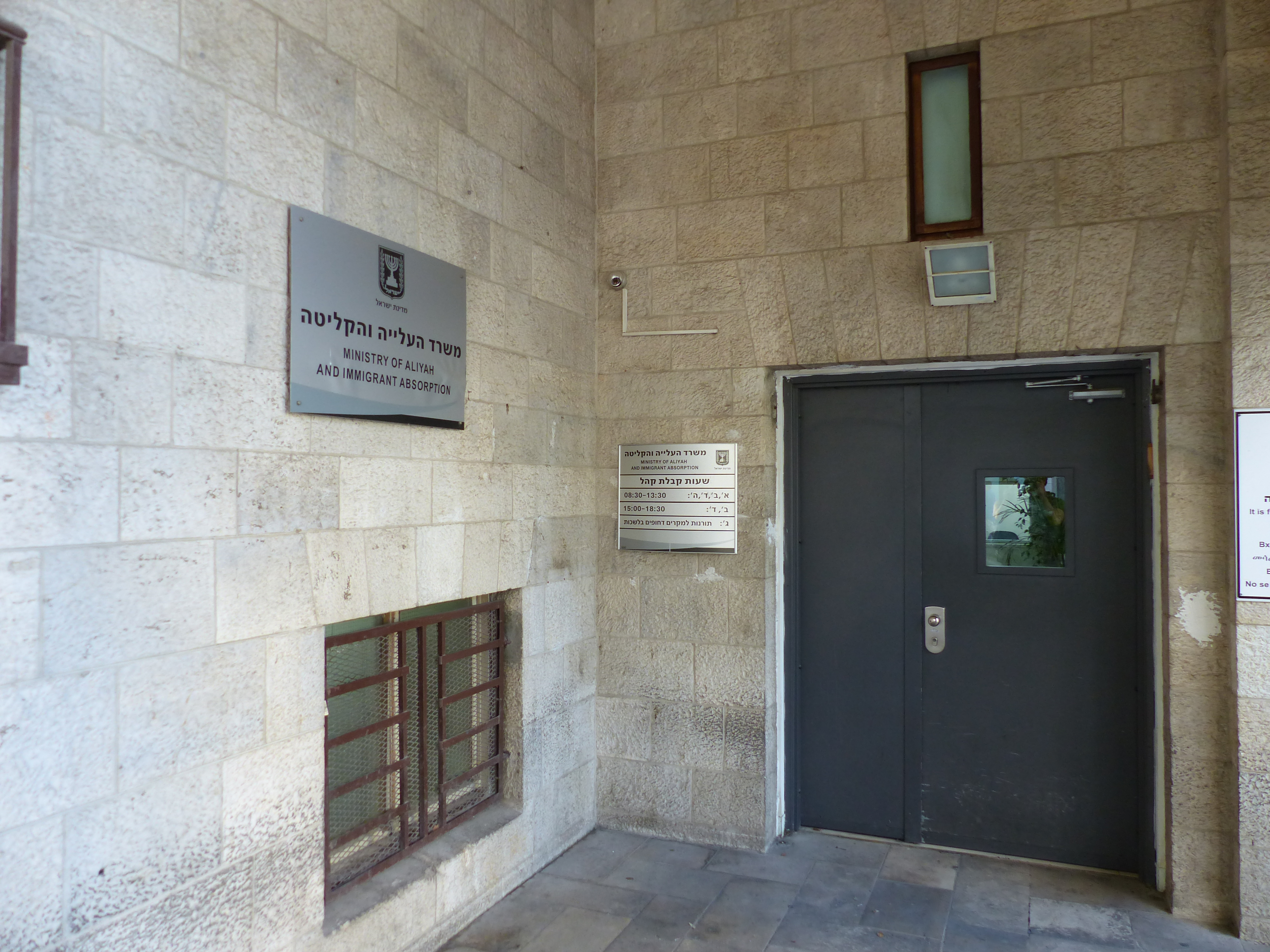 Ministerio del Aliya, Jerusalén, Israel